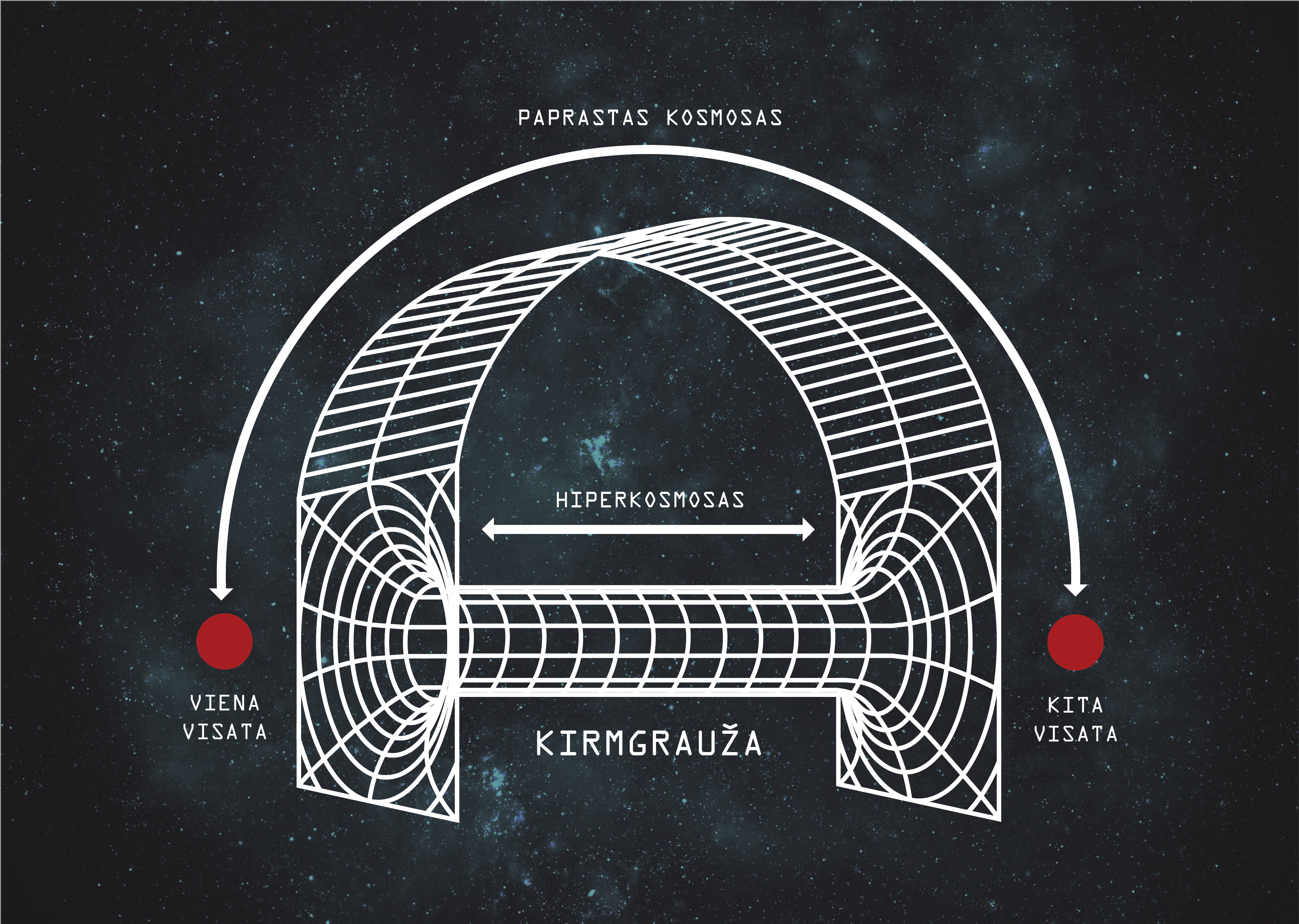 Kirmgrauzos schema